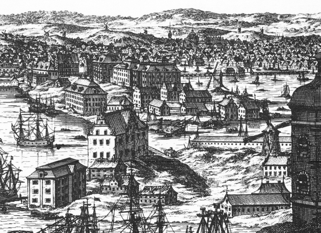 Detalj ur Erik Dahlbergs, Svecia Antiqua et Hodierna från omkring 1670-90. Vy från Kastellholmen över Skeppsholmen mot Blasieholmen. Förlagan till målningen från 1700, File:Kastellholmen Skeppsholmen 1700.jpg, av okänd konstnär. Skeppsholmskvarnen och Holmkvarnen